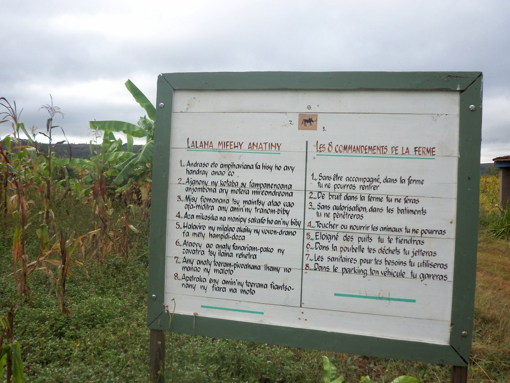 commandements de la ferme